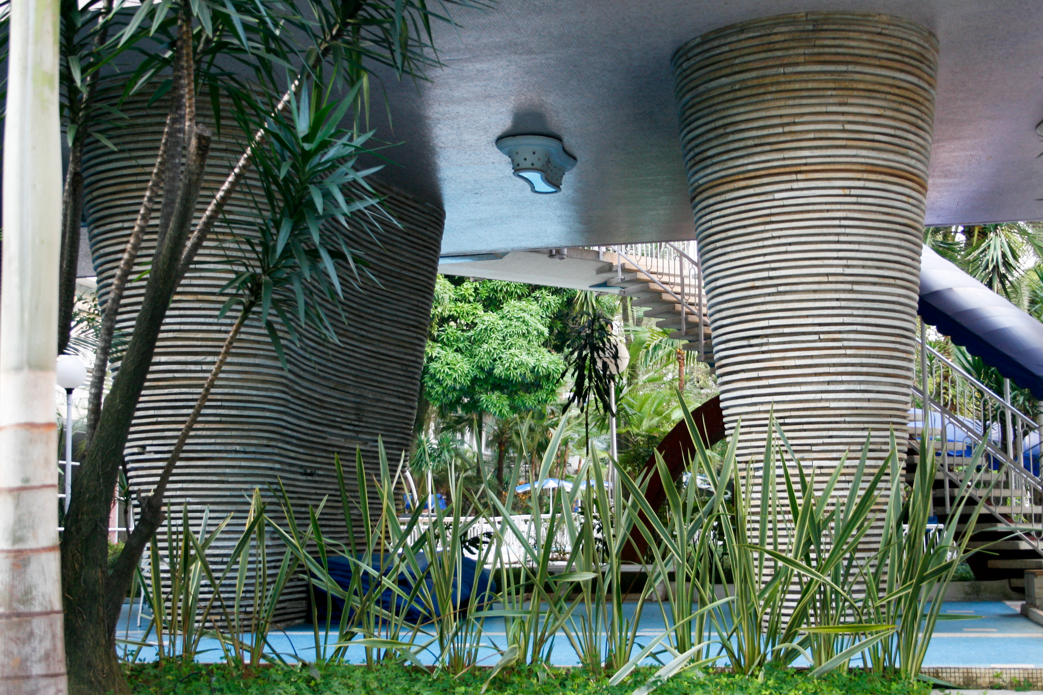 Avenida Higienópolis, 938, Higienópolis. Foto por André Deak para o Arte Fora do Museu (